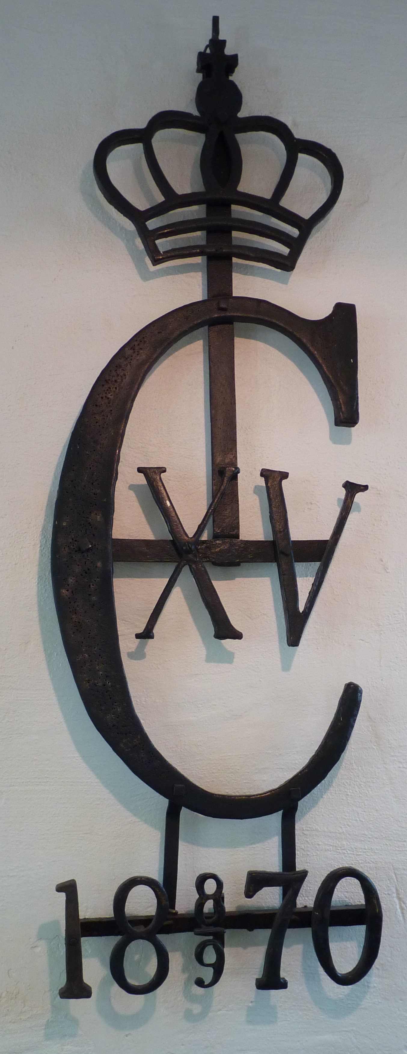 Carl XV.s monogram, gjutet vid besök av konungen 1870.